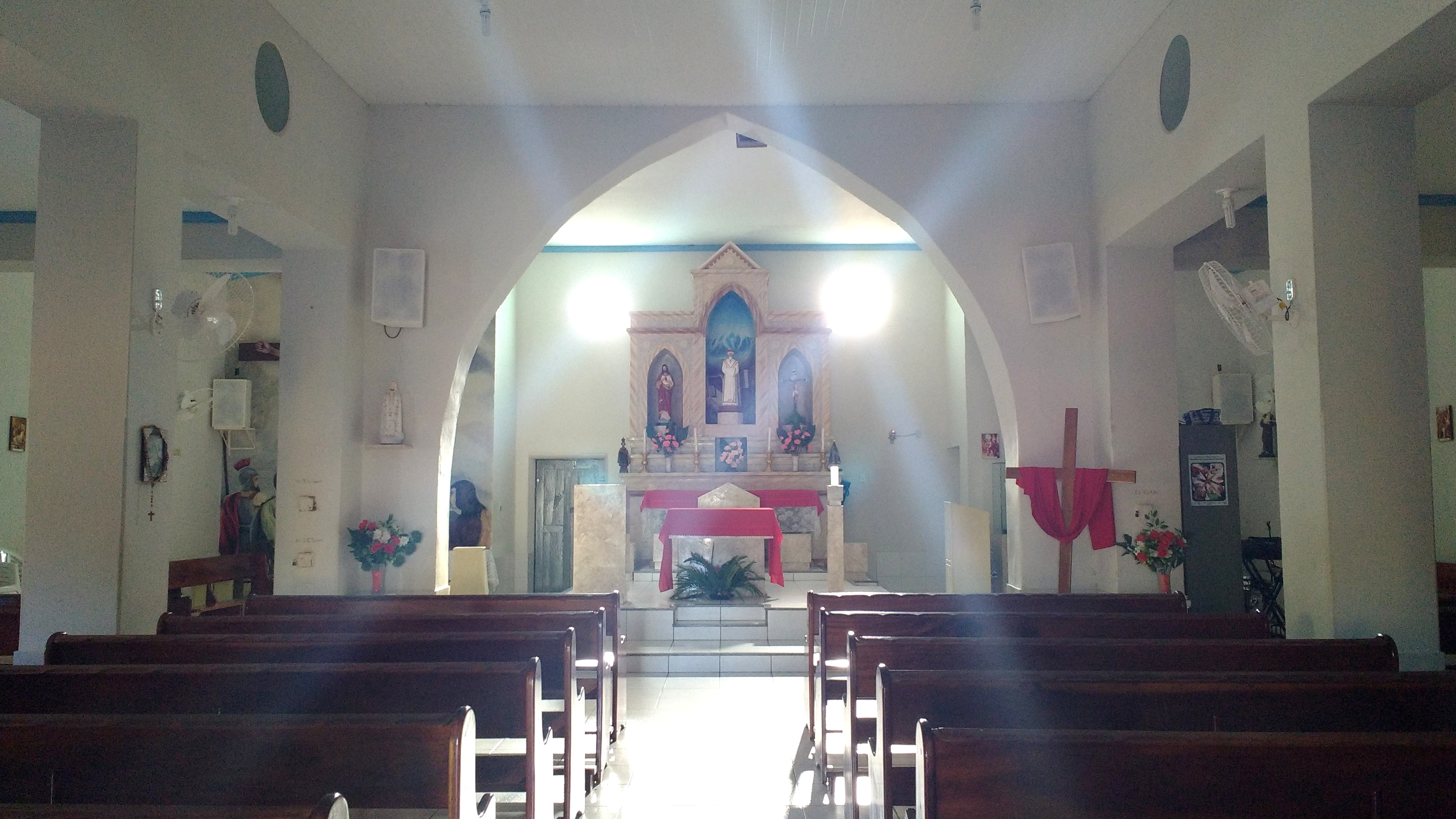 Interior da Capela Nossa Senhora da Salete, padroeira de Serrinha dos Pintos, Rio Grande do Norte (Brasil)